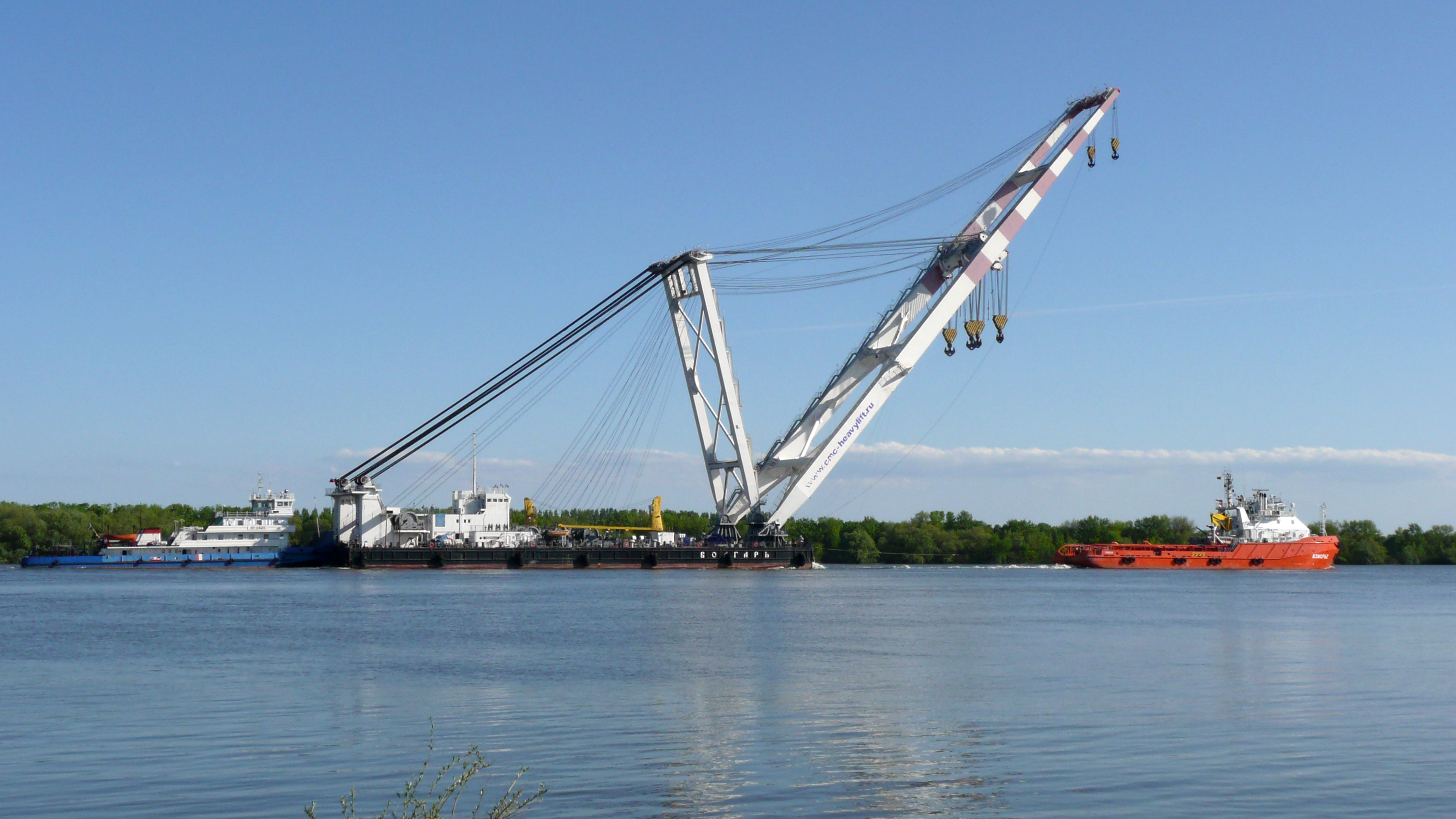 "Волгарь"